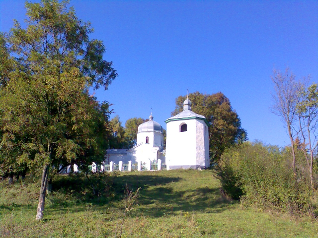 Церковъ в пгт.Глуховцы, Казатинский район,Винницкая область